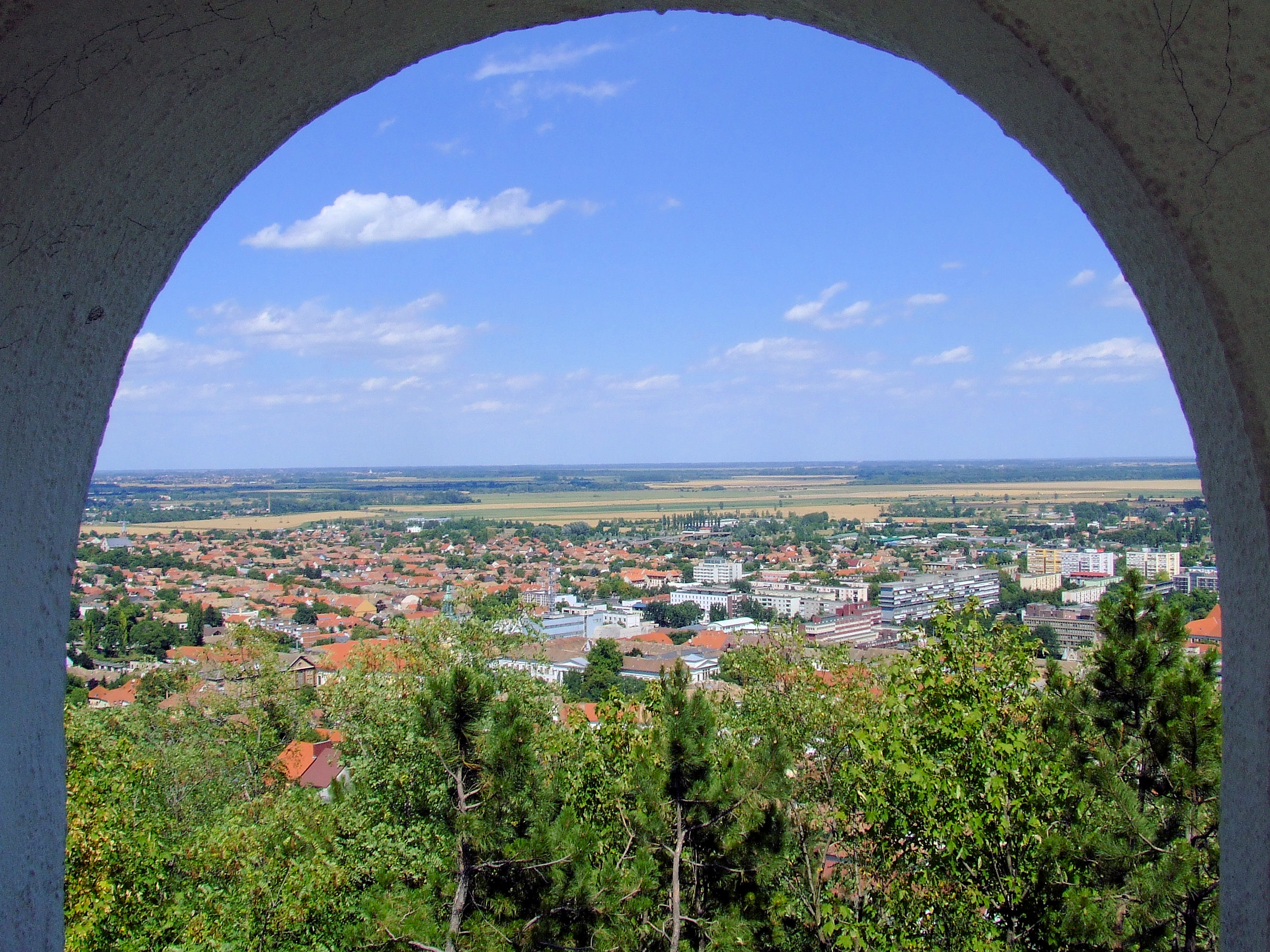 Szekszárd a kilátóból